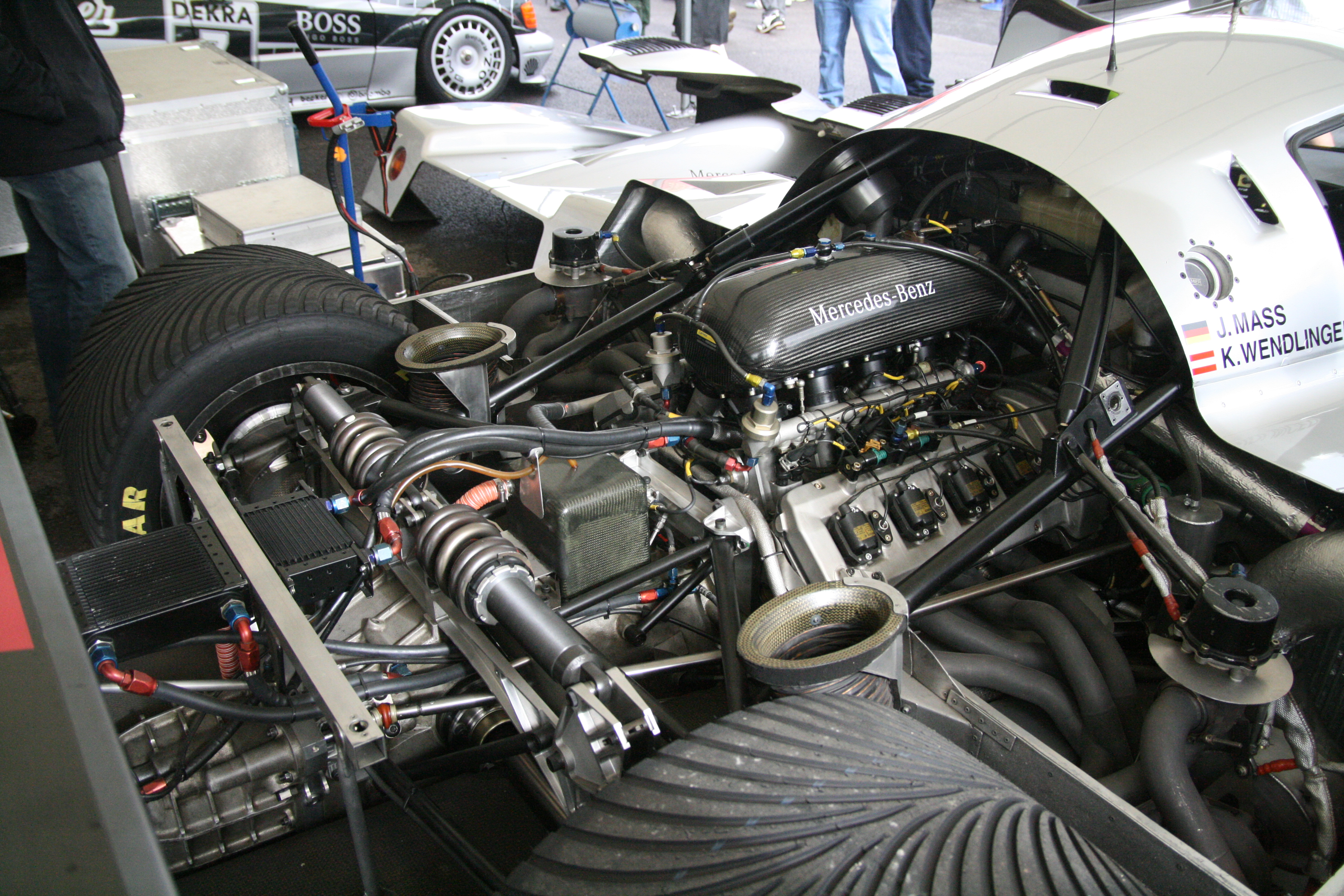 A Mercedes-Benz M119 V8 engine installed in a Mercedes-Benz C11